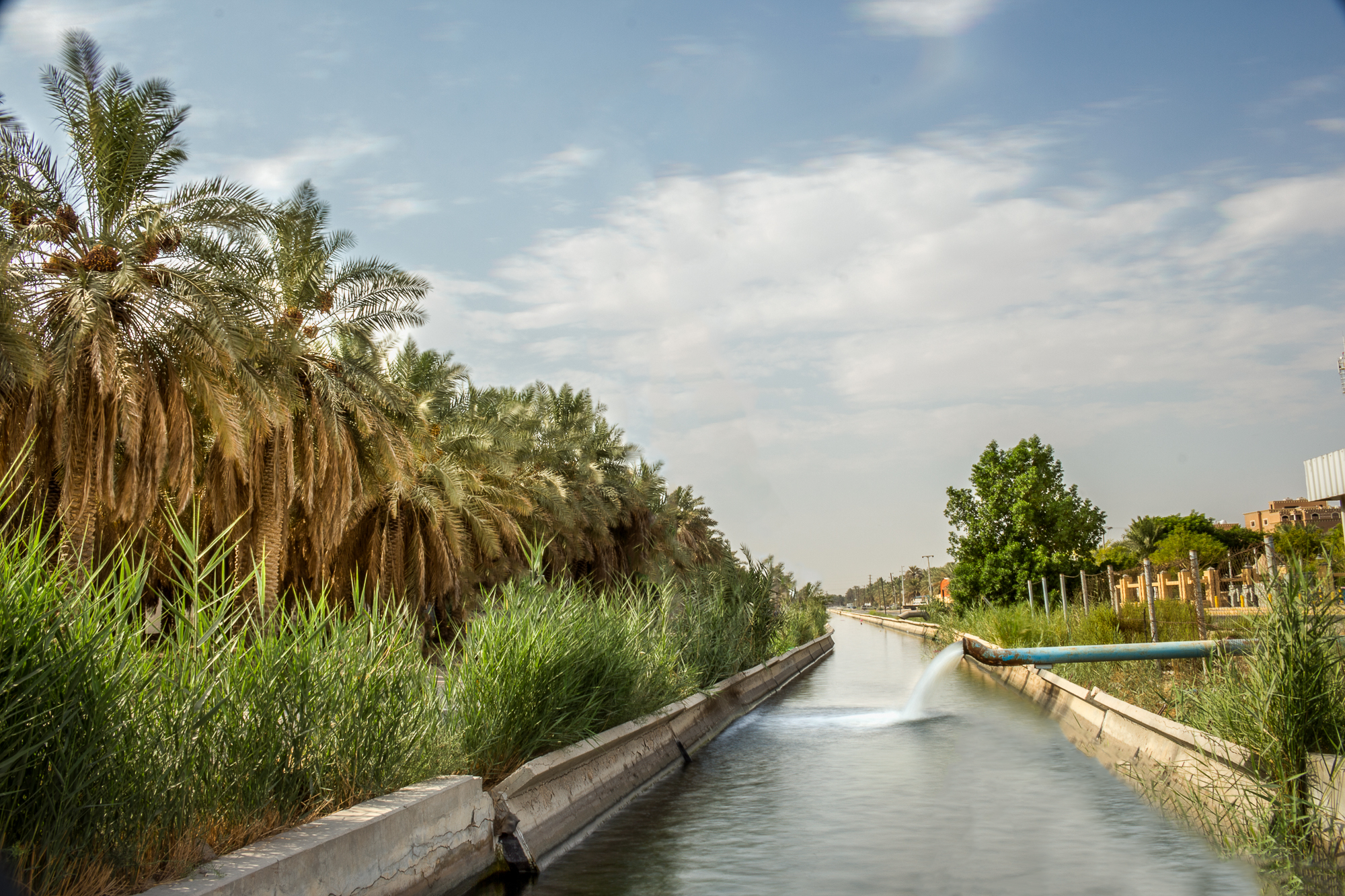 محطة اللتقاء ماء عين الجوهرية ببرنامج الري والصرف في الاحساء, المملكة العربية السعودية